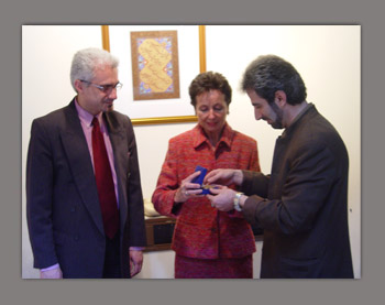 remise de medaille Caillebotte